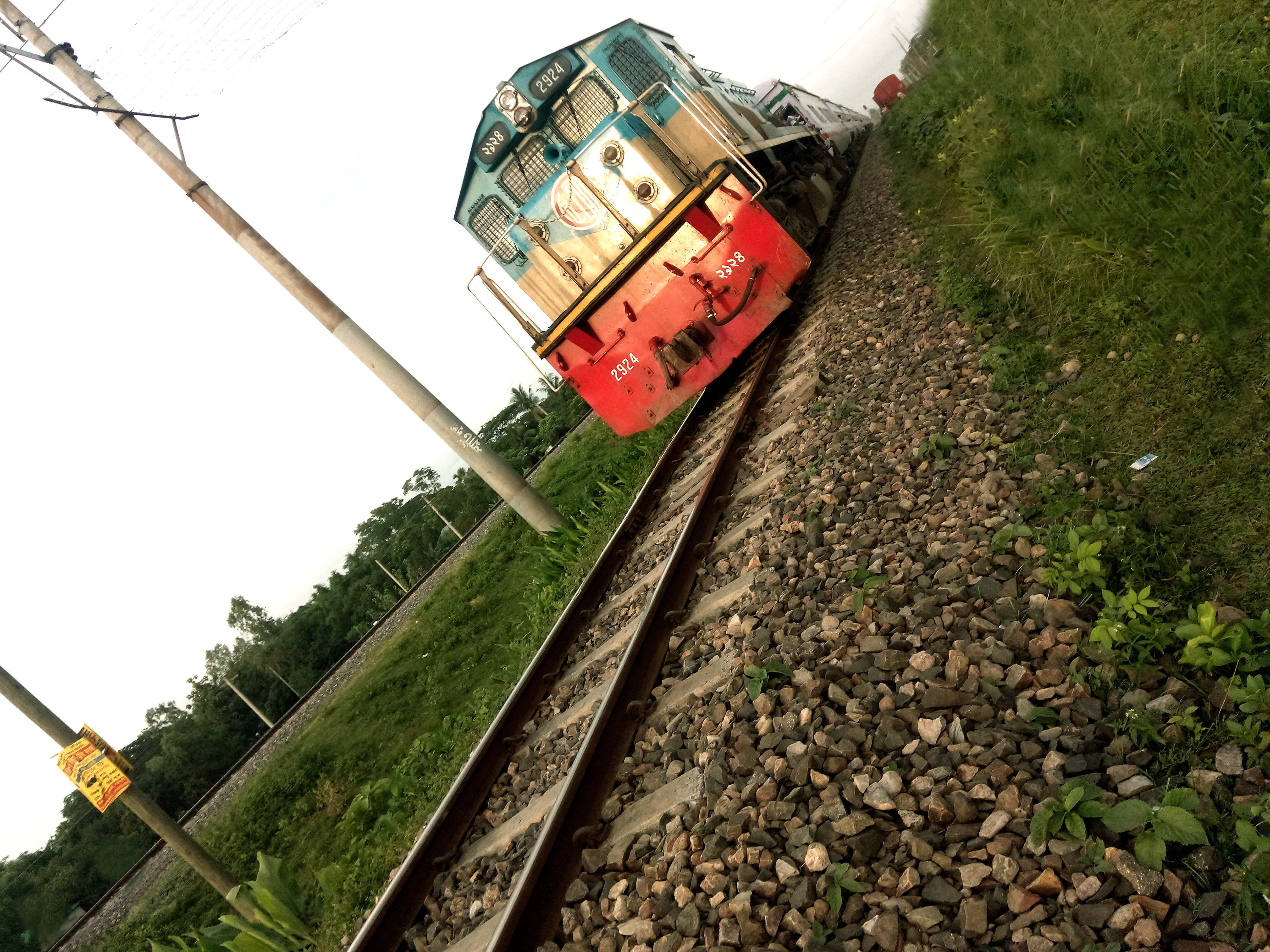 ঘোড়াশাল